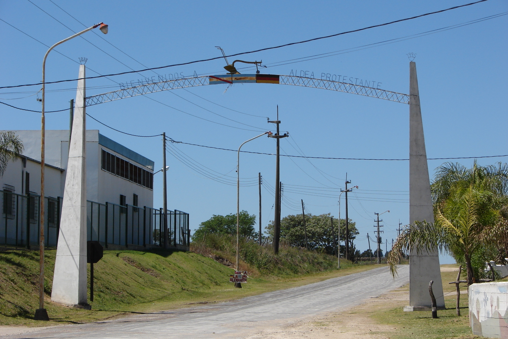 Aldea Protestante, Entre Ríos, Argentina